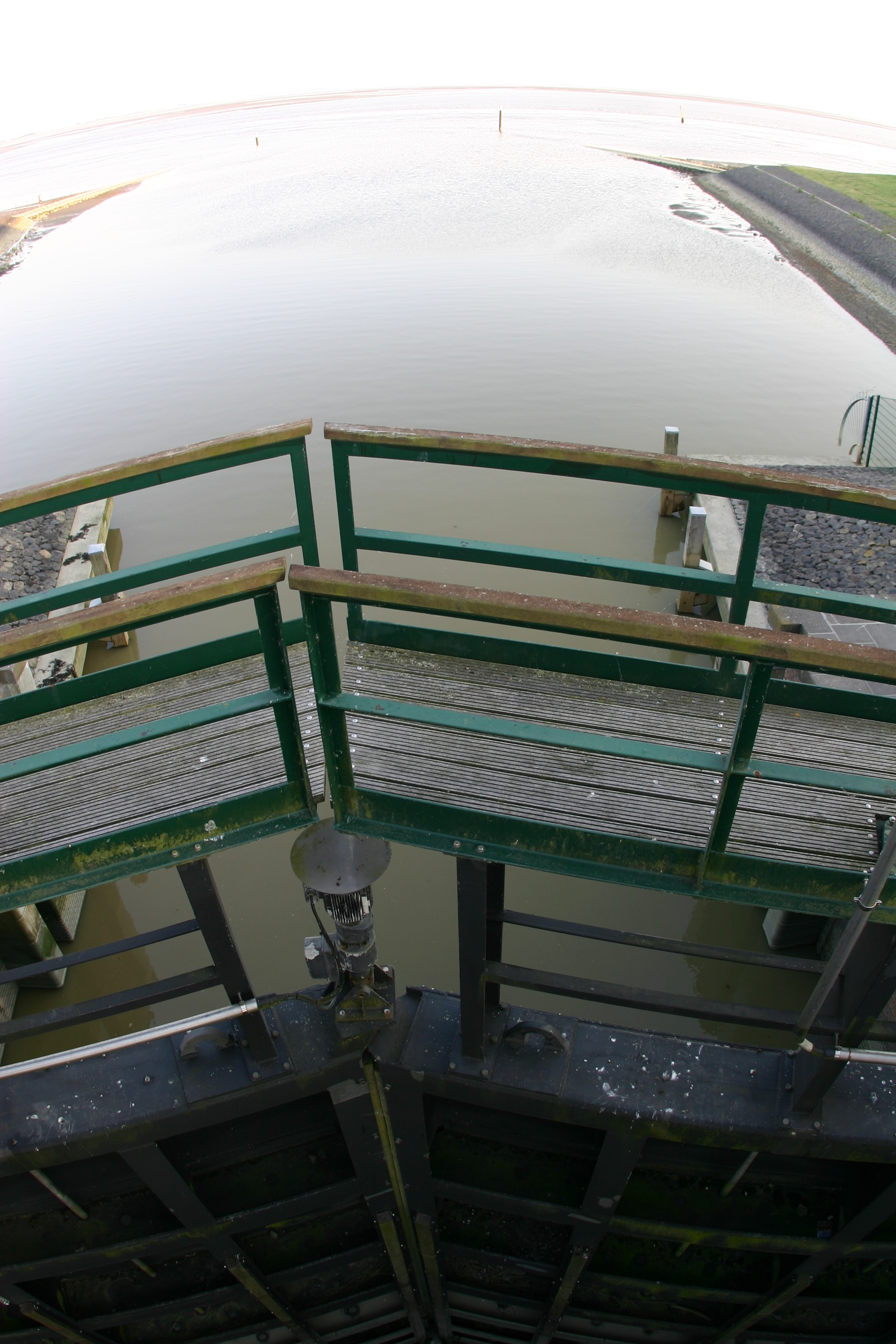 Äußeres Sieltor des Borssumer Siels in Emden (Ostfriesland, Niedersachsen) mit Blick auf die Ems, in der Ferne das gegenüberliegende Ufer (Gemeinde Jemgum)